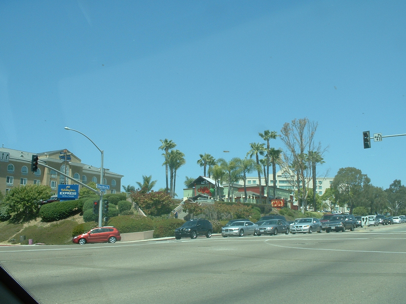 Sorrento Valley, San Diego, CA, USA